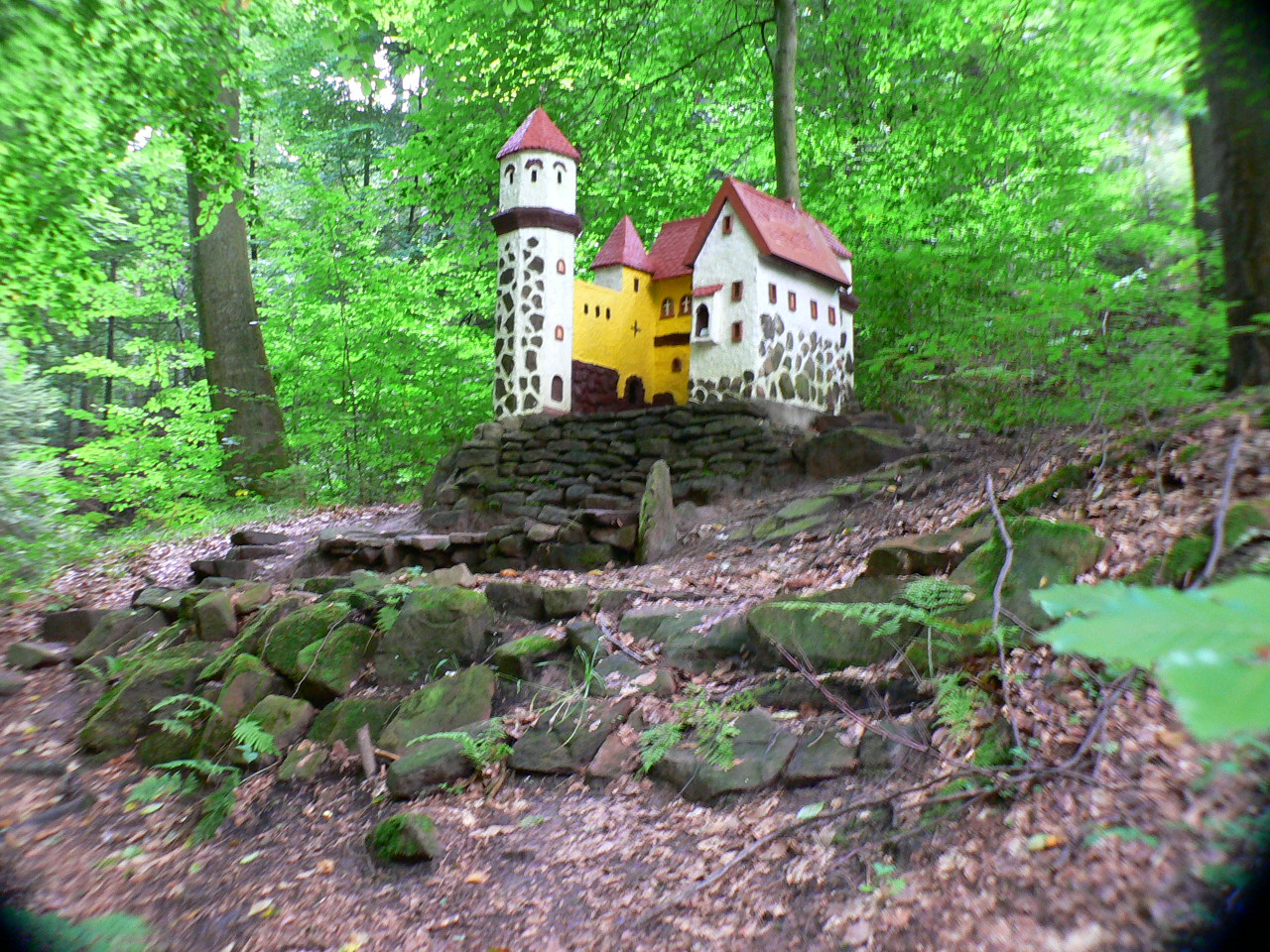 Miniatur einer Burg in der Obrunnschlucht bei Höchst im Odenwald